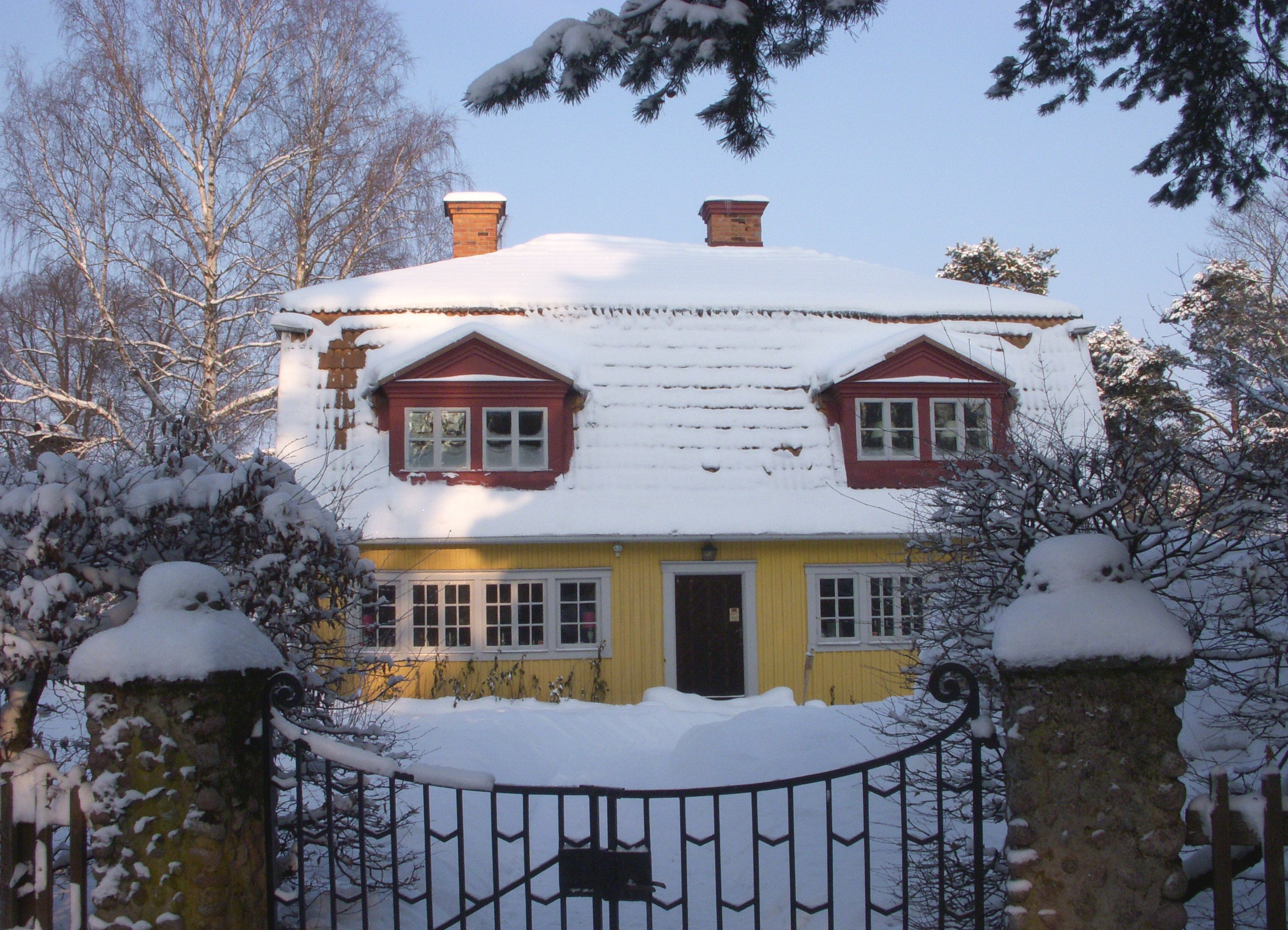 Köksflygeln till "Gamla Haga" i Hagaparken, Solna